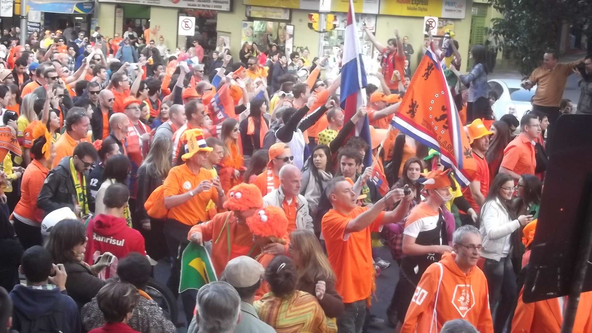 Copa FIFA 2014 - Torcedores dos Países Baixos em Porto Alegre - 2014-06-18